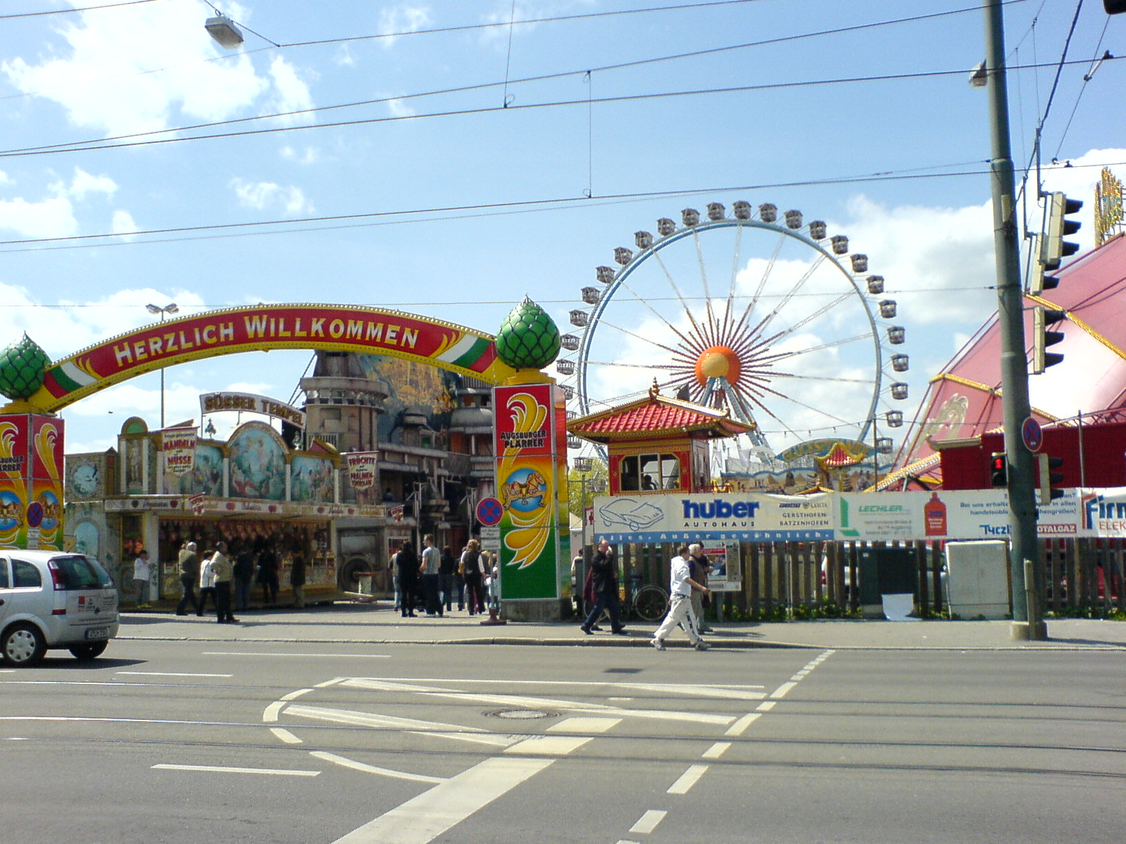 Letzter Tag des Osterplärrers 2006 in Augsburg